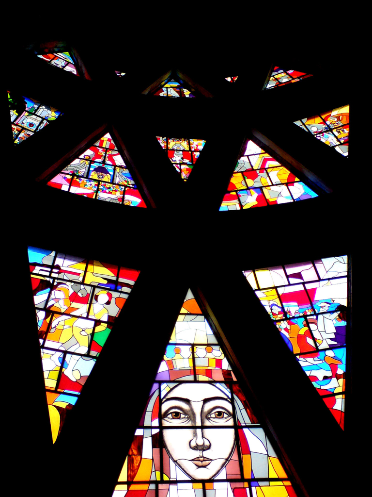 La Virgen de Nuestra Señora de Coromoto es la patrona de Venezuela. Venerada tanto en la ciudad de Guanare, donde apareció hace aproximadamente 350 años, como en todo el país. El Santuario Nacional Nuestra Señora de Coromoto, está ubicado en el Poblado Quebrada de la Virgen, sobre el sitio de aparición de la Virgen por segunda vez al cacique Coromoto, fue un proyecto realizado por el Arquitecto Erasmo Calvani en el año de 1975, la obra se inició en el año 1980. Su construcción es totalmente de concreto de obra limpia, su altura varia entre 76 y 68 metros. estructura única en el mundo, llamada doble hiperboloide elíptico. Cuenta con dos torres paralelas de aproximadamente 80 metros de altura y con un cimborrio (especie de cúpula) de 54 metros aproximadamente. En la girola se pueden admirar bellos vitrales, obra del artista Guillermo Márquez. Tiene pisos de mármol y tres altares, incluyendo al altar mayor. Se construyó totalmente en concreto obra limpiase con una estructura única en el mundo, llamada doble hiperboloide elíptico conocida también como cimborrio. Bajo el cual (en la girola) se aprecian los vitrales, obra del artista Guillermo Márquez, quien desarrolló un sistema nuevo de montajes en nervios de concreto. Fue inaugurado el 10 de Febrero de 1996 por su Santidad Juan Pablo II, quien vino a Venezuela a inaugurar y bendecir este Santuario que hace de Portuguesa y su capital, Guanare, la Capital Espiritual de Venezuela. La primera imagen que ofrece el templo desde sus vías de acceso se traduce en una maravillosa e impresionante experiencia para el viajero.